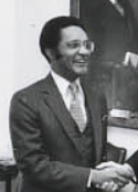 Tony Brown